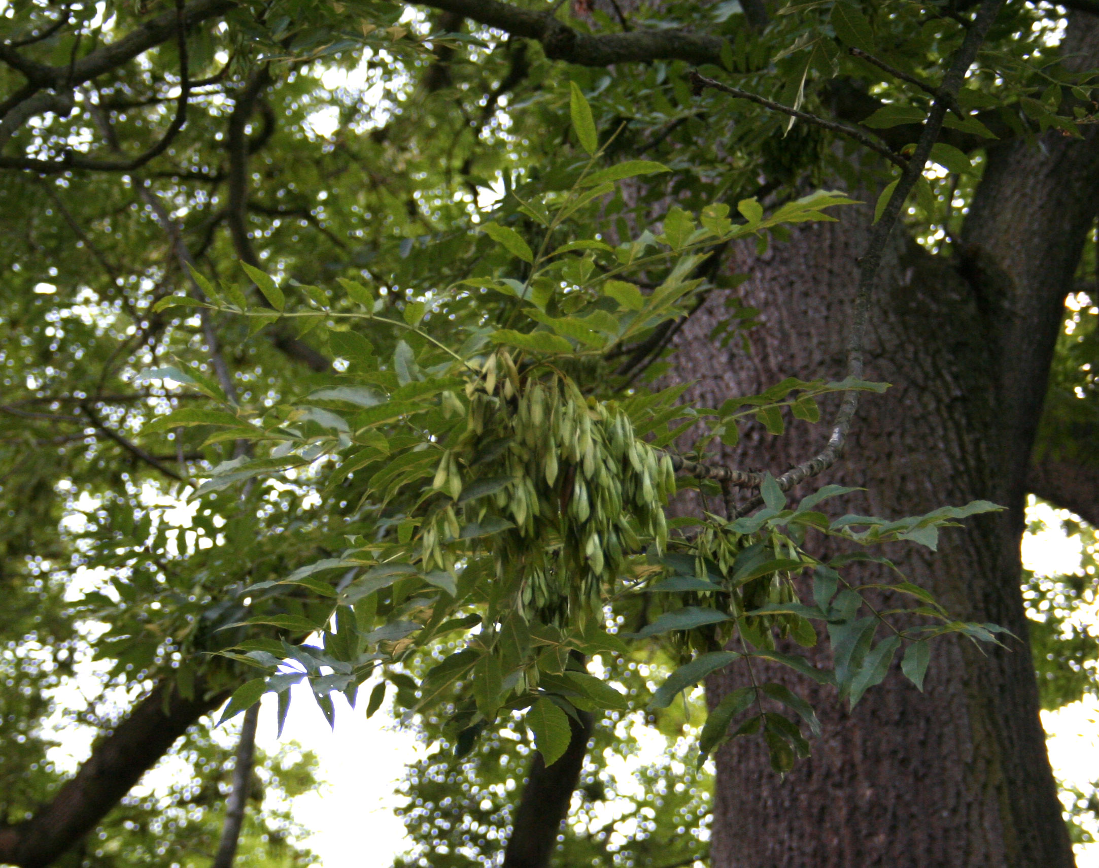 Nasiona_jesionu wyniosłego